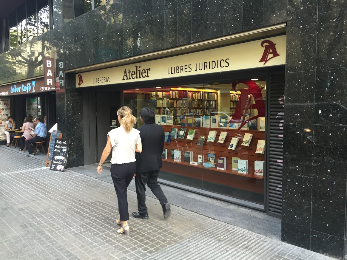 Llibreria Atelier Barcelona. Especialització en jurídica